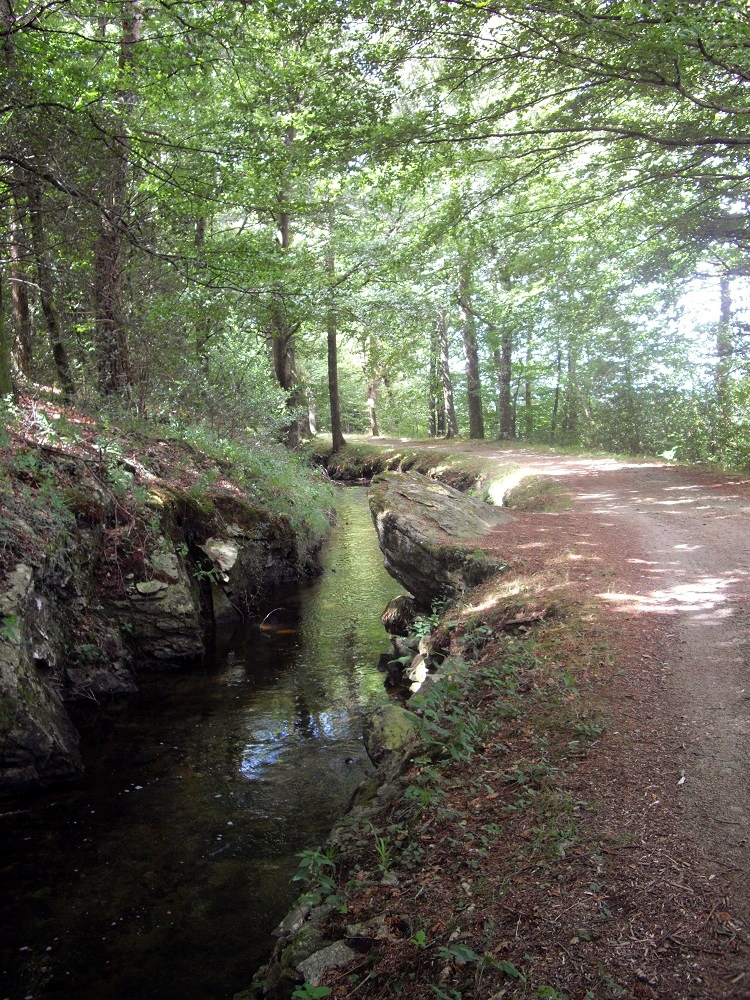 Rigole de la montagne (France)